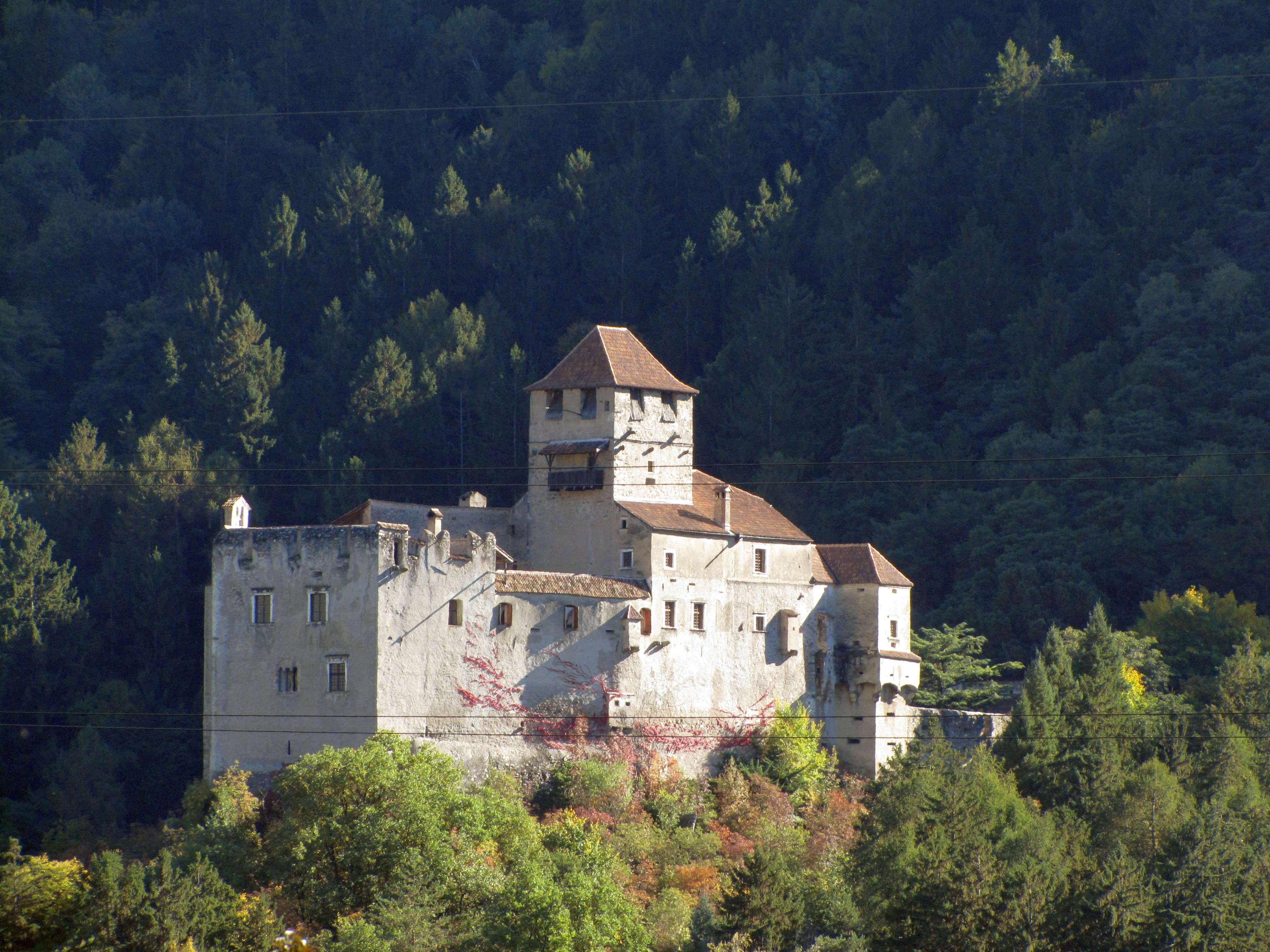 Dornsberg bei Naturns (Südtirol)